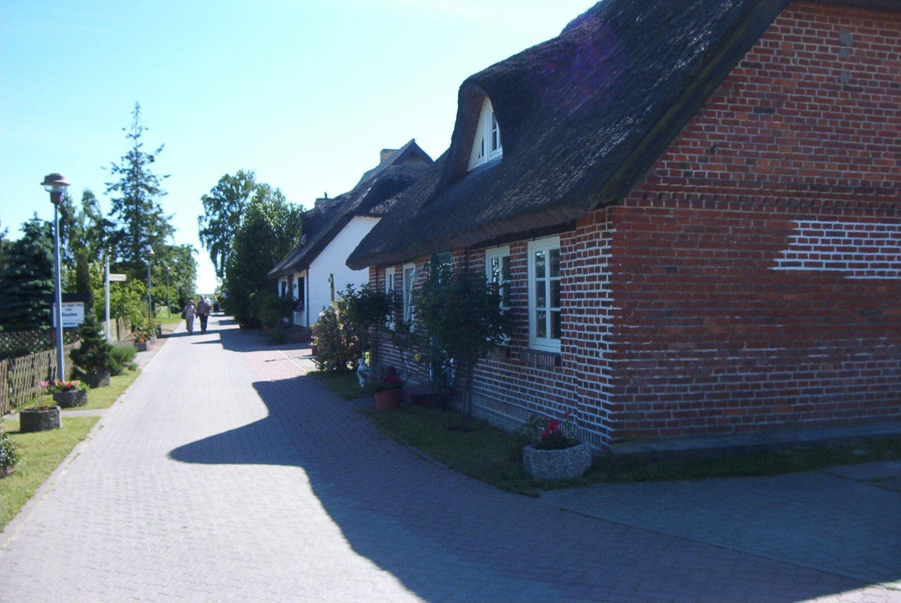 Moritzdorf, Ortsteil von Sellin, Bild aufgenommen am 18.6.2005 durch Olaf Meister